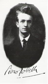 Piero Gobetti, Italian radical liberal